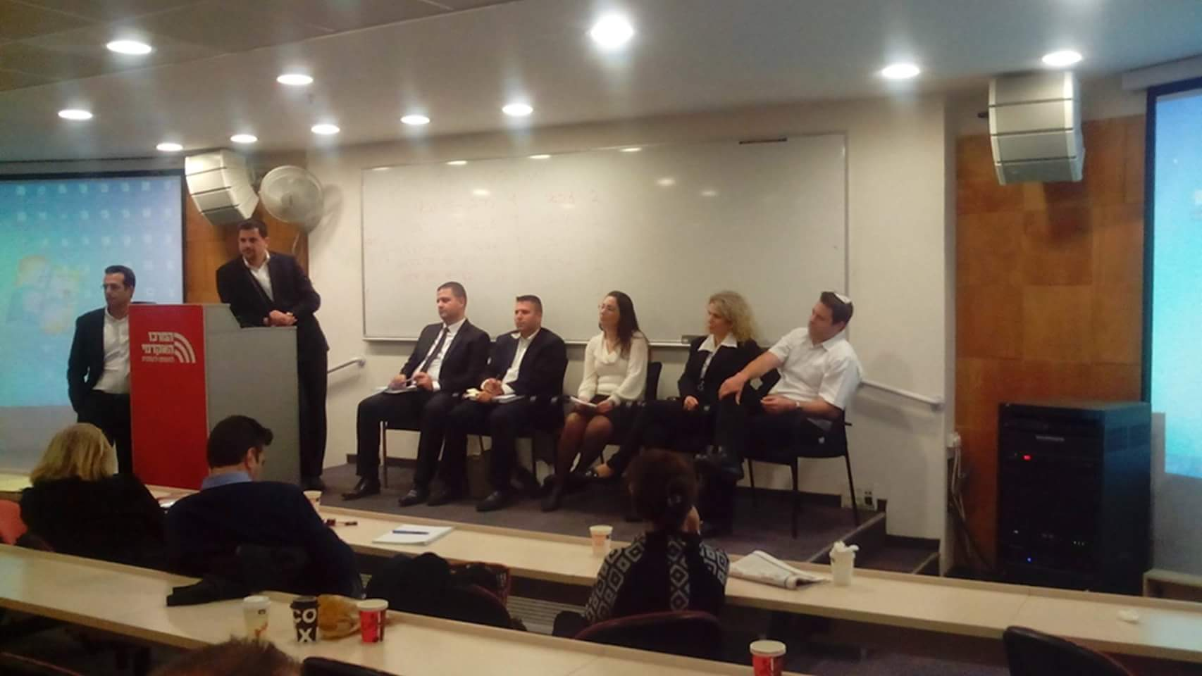 שיח רשמי הוצאה לפועל בלשכת עורכי הדין